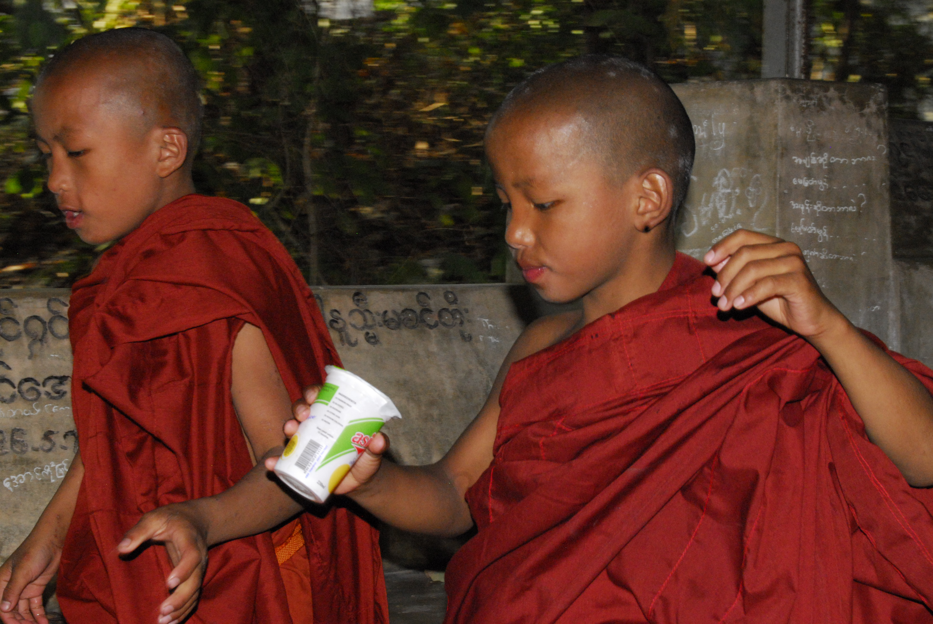 Monks children